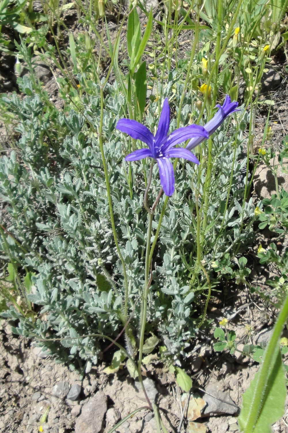 Ixiolirion tataricum ssp. montanum, Իքսիոլիրիոն թաթարական, Иксиолирион татарский